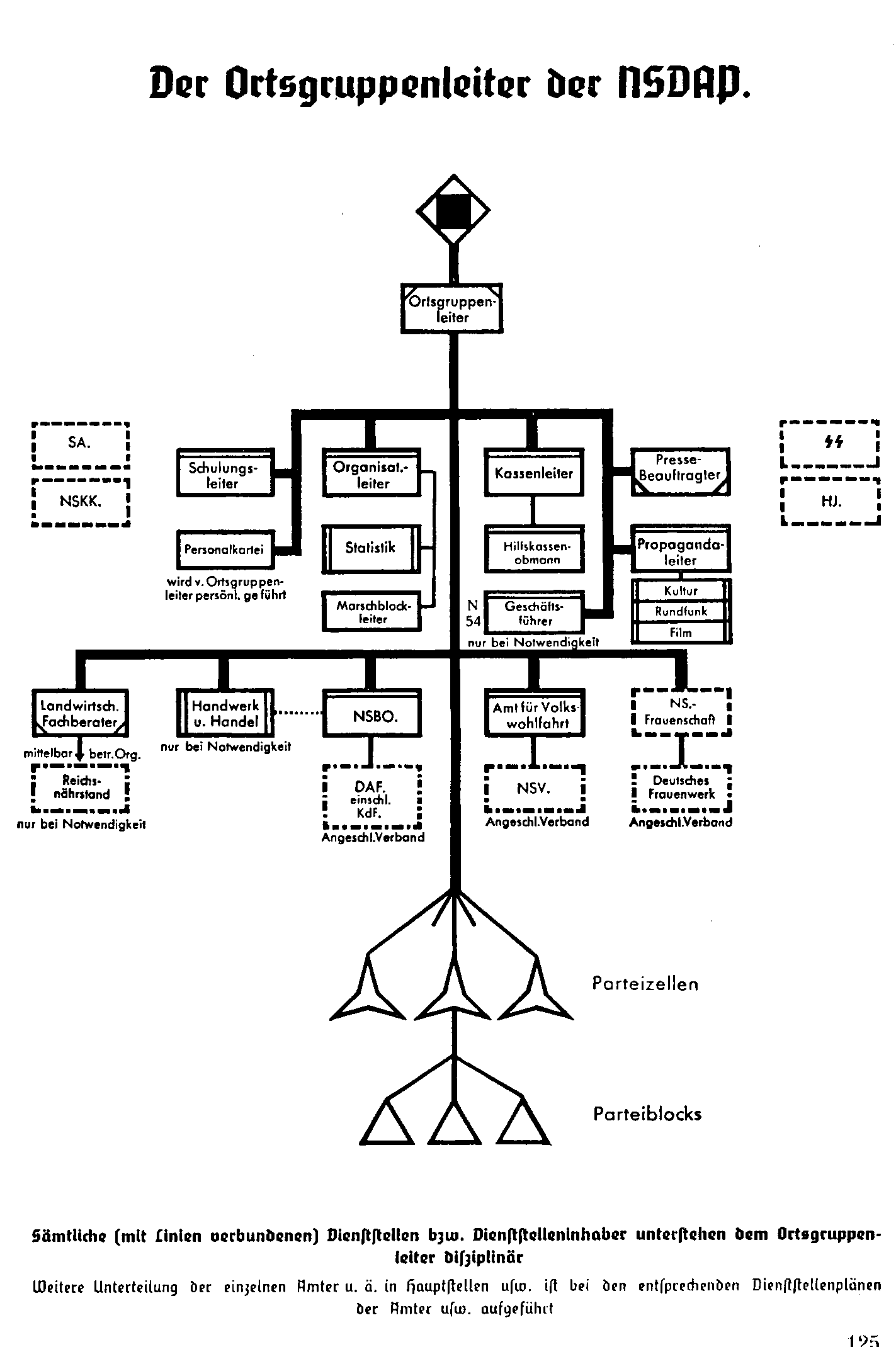 Organisationsschema Scan aus: Organisationsbuch der NSDAP, 4. Auflage München 1937